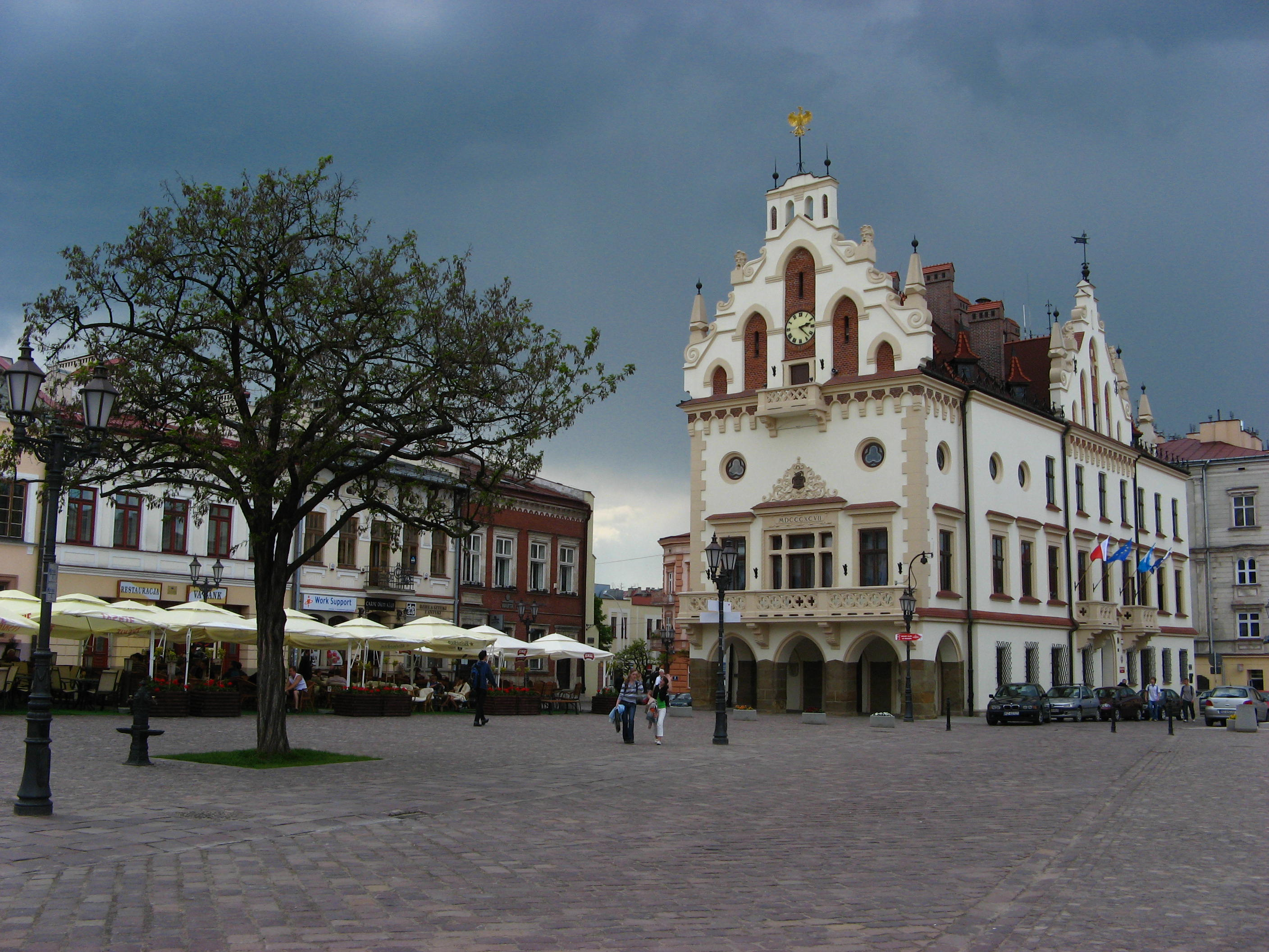 Rzeszów - ratusz